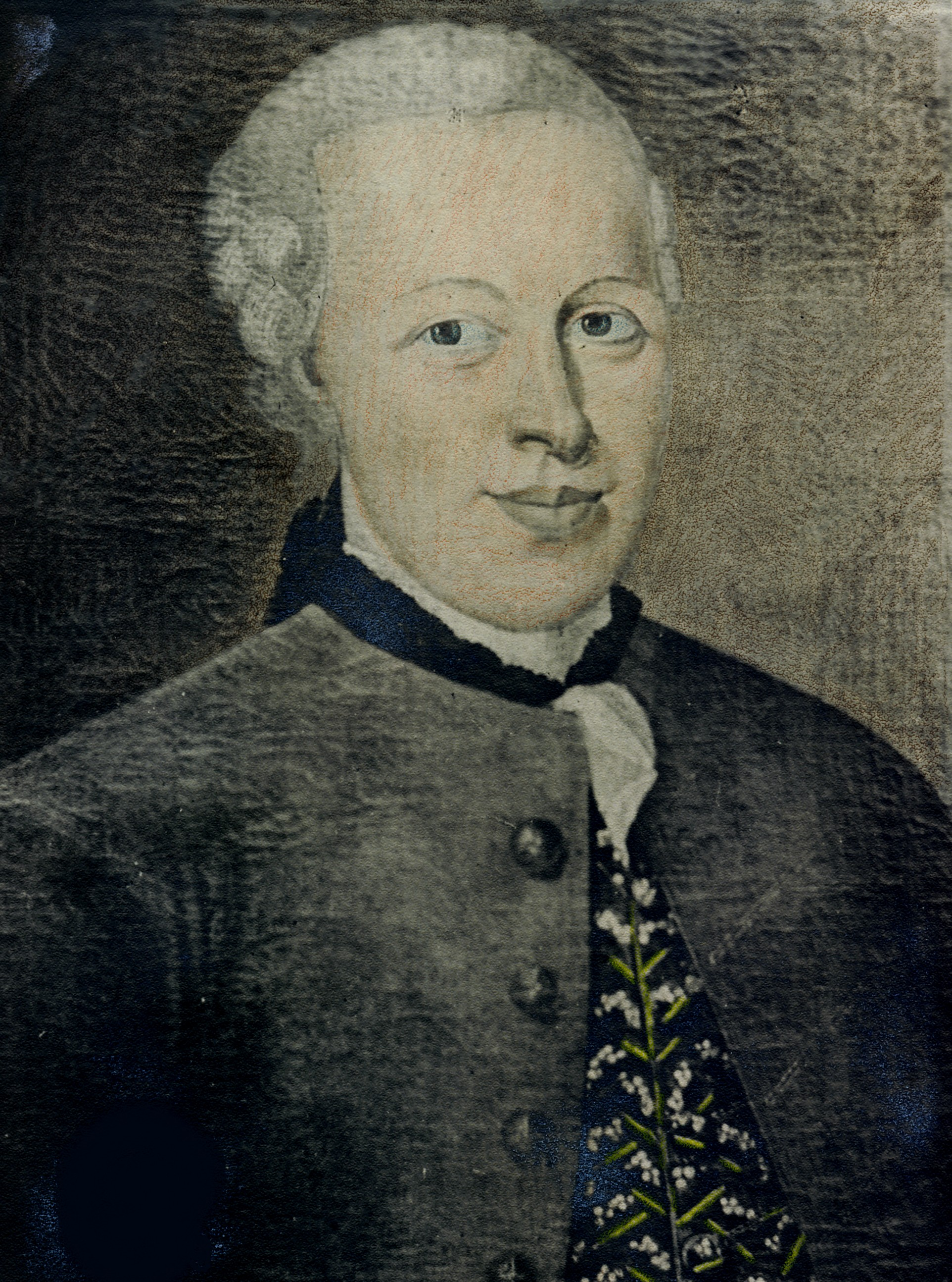 Joachim Christian Timm, gemalt vom mecklenburgischen Maler F. G. Herzog